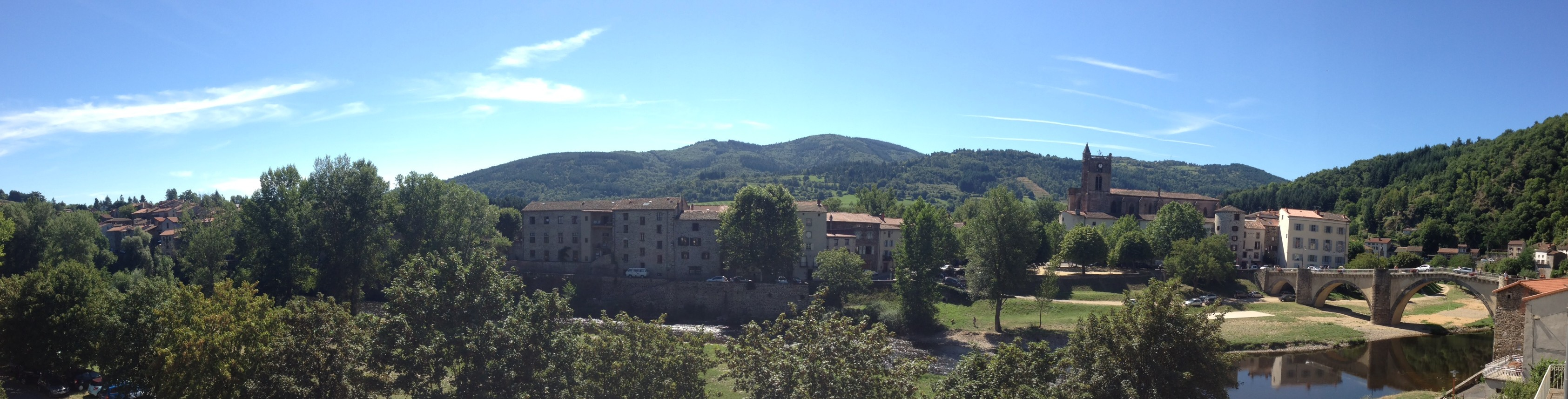 Le village de Lavoûte-Chilhac en Haute Loire.